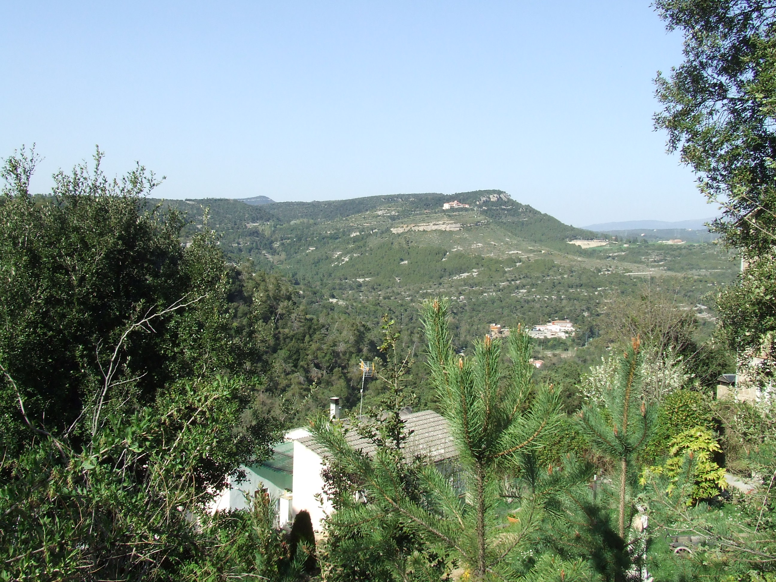 Puigdolena i el Puig d'Olena (Sant Quirze Safaja, Moianès)